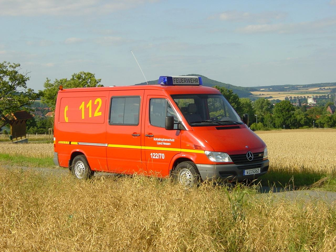 Strahlenspürtruppfahrzeug der Feuerwehr Hofgeismar